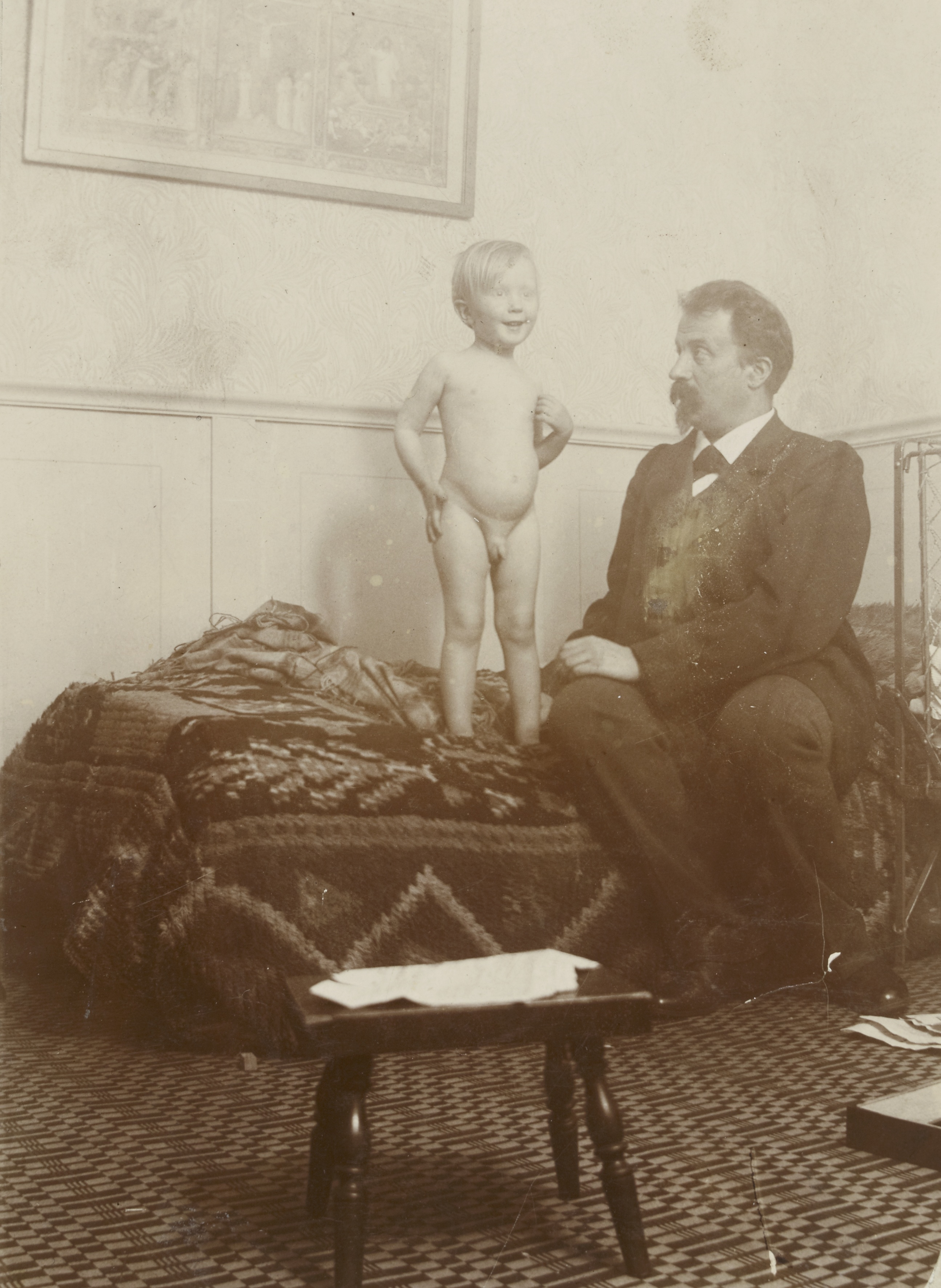 Juhani Aho poikansa Heikki Ahon kanssa Tuusulassa vuonna 1897